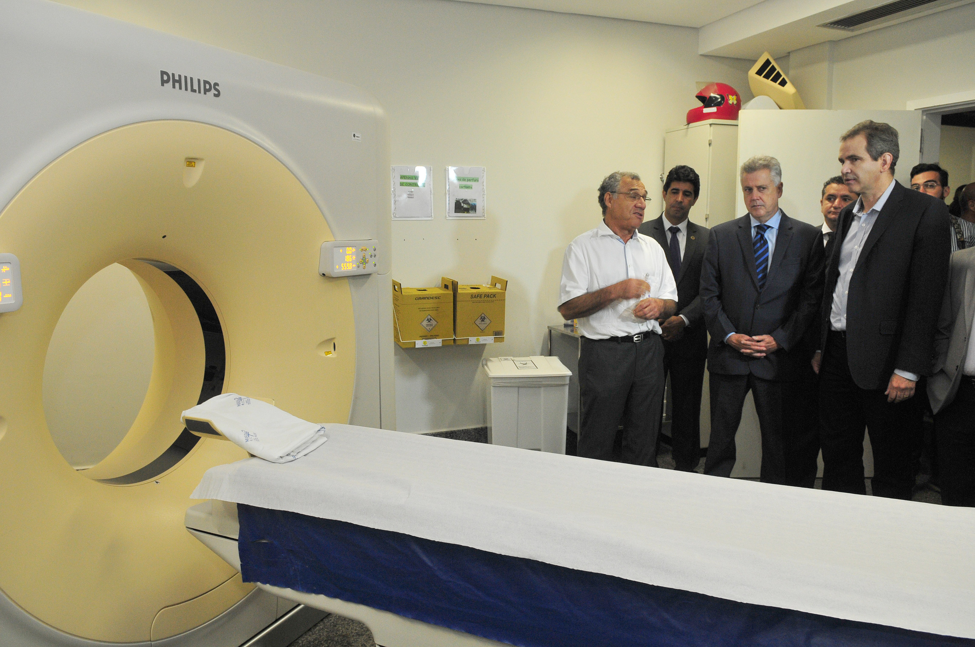 Visita ao Hugol, por autoridades de Goiás e Distrito Federal.